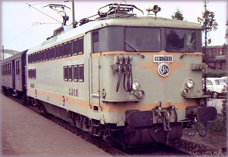 La BB 17036 a très tôt adopté la livrée béton pour s'harmoniser avec les voitures de banlieue VB2N. Cette livrée cohabitait avec celle de rames Talbot (photo) , des rames inox RIB, et des voitures Etat, outre les wagons Fret et certains express..